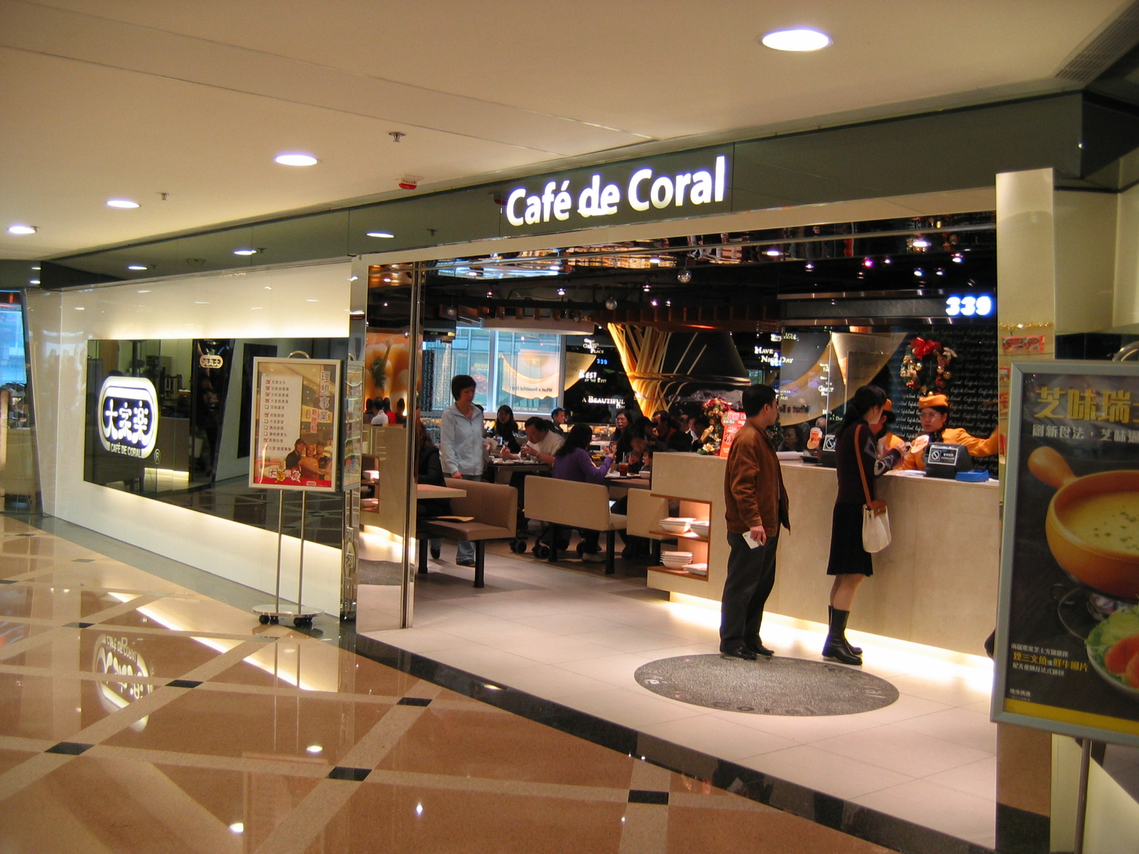 香港一家快餐店 - 大家樂